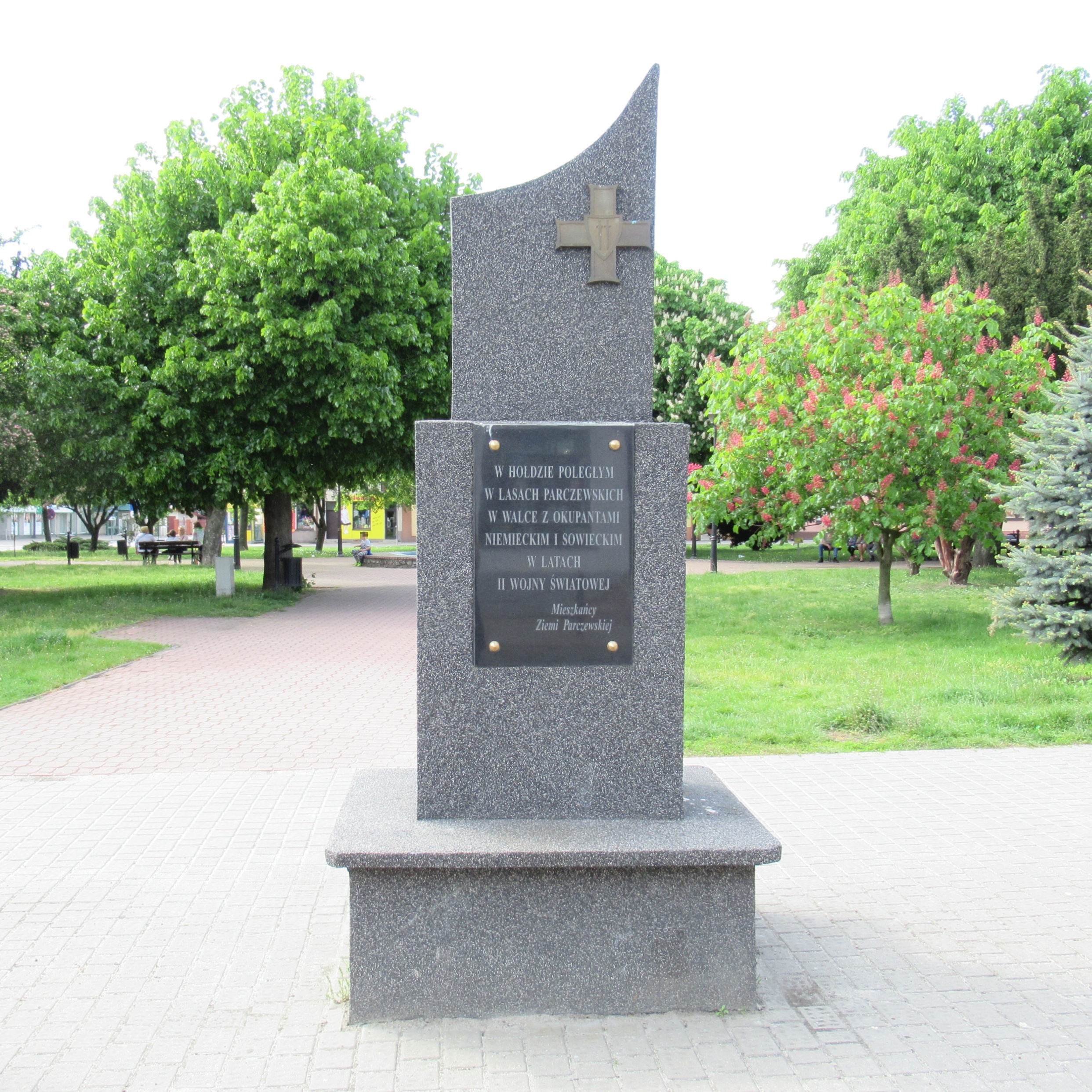 Parczew. Pomnik w rynku (zwanym tu Placem Wolności).